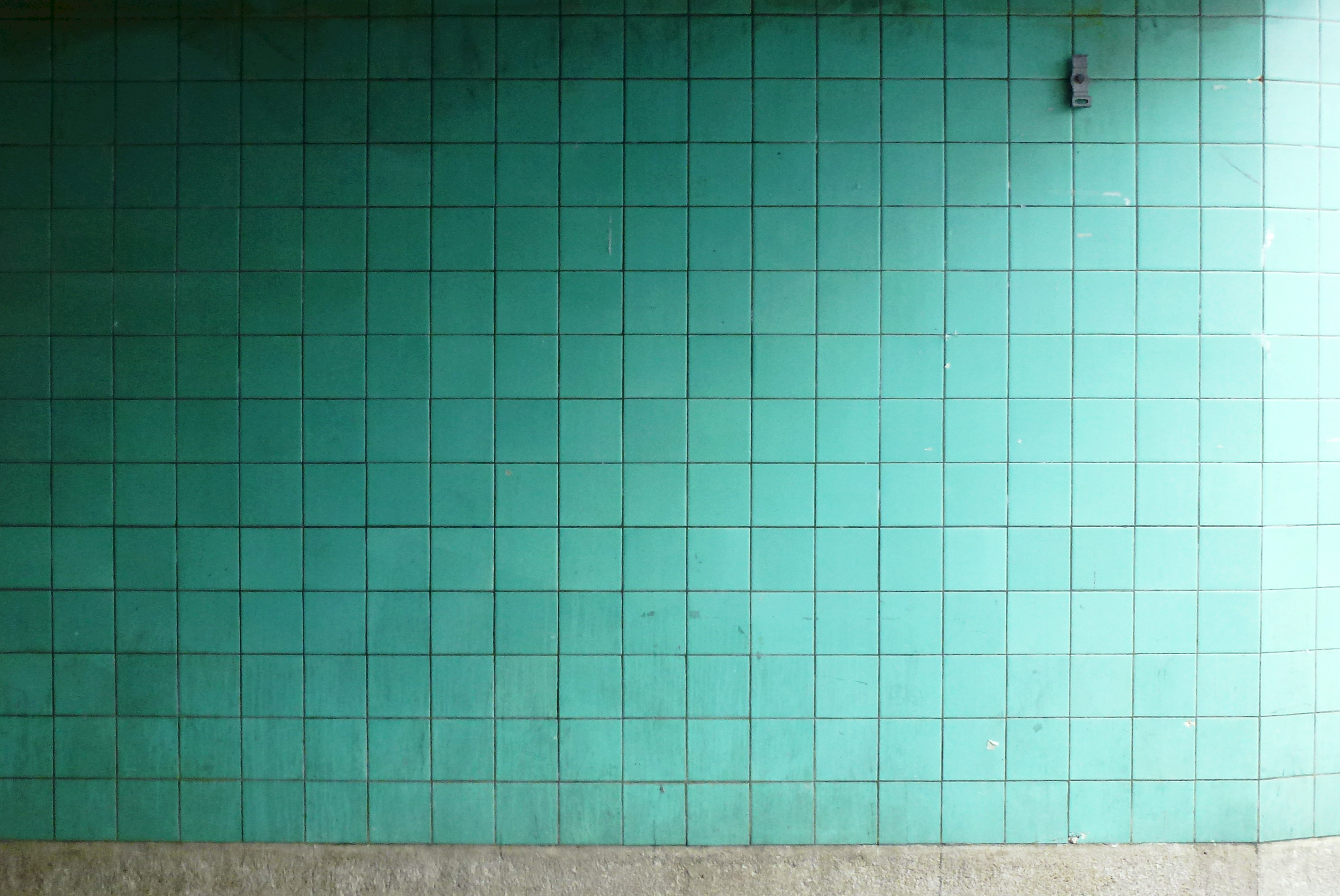 Slussen, Gröna Gången i november 2014 (östra del)